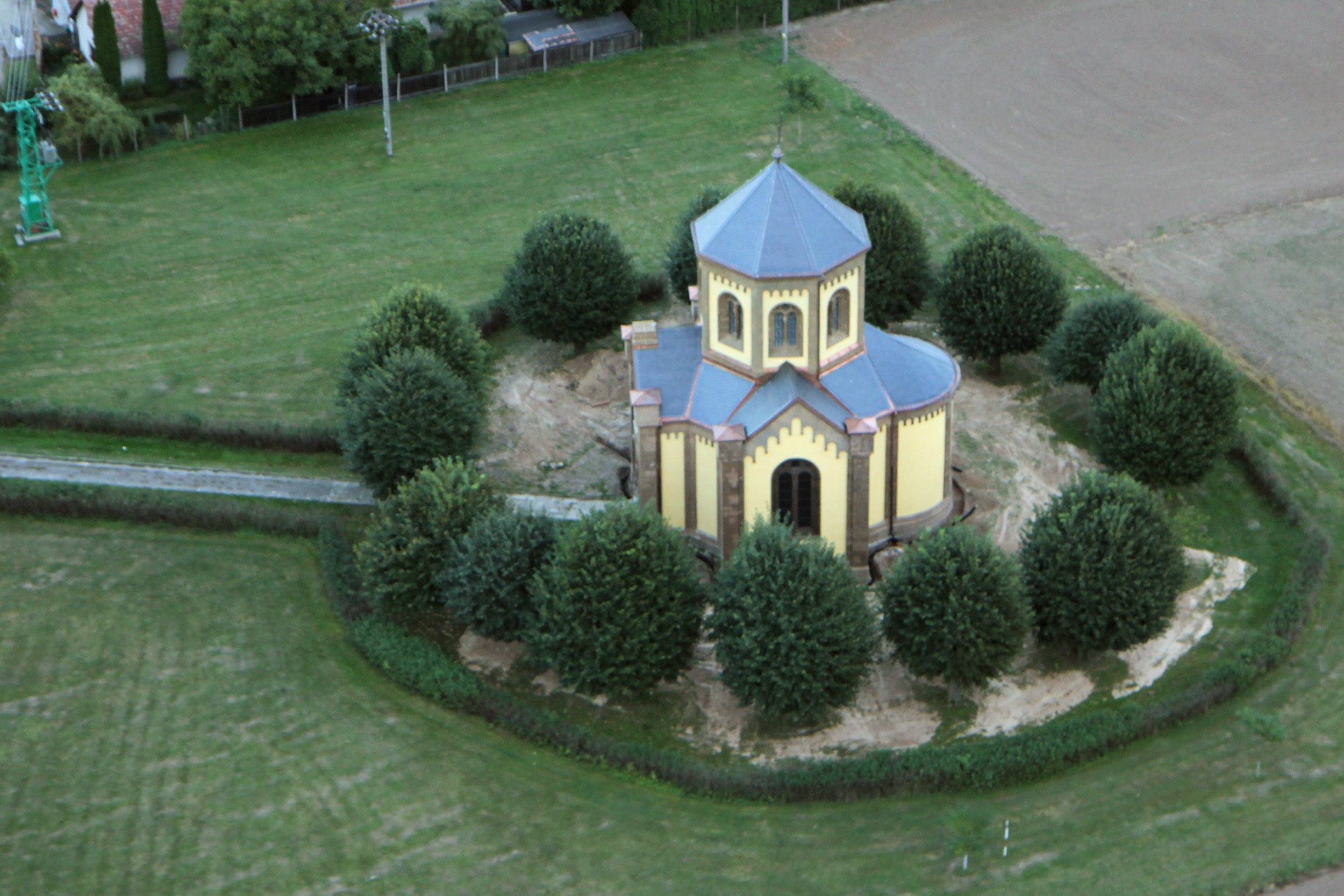 Kaple Korunování P. Marie (Niměřice), JZ okraj vsi, při zámku, Niměřice